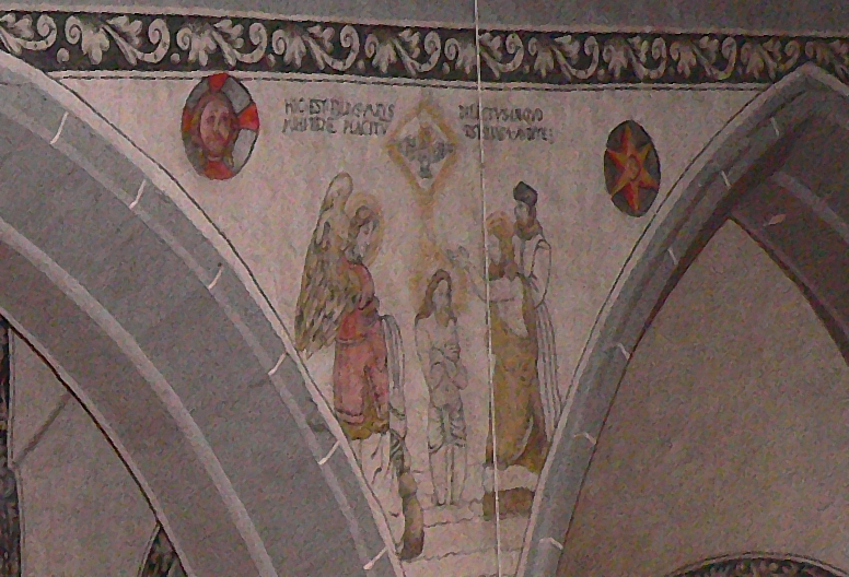 Evangelische Kirche St. Laurentius in Dassel, Niedersachsen, Deutschland - Protestantische Renaissancemalerei (Secco): "The Baptism of Christ" von 1577